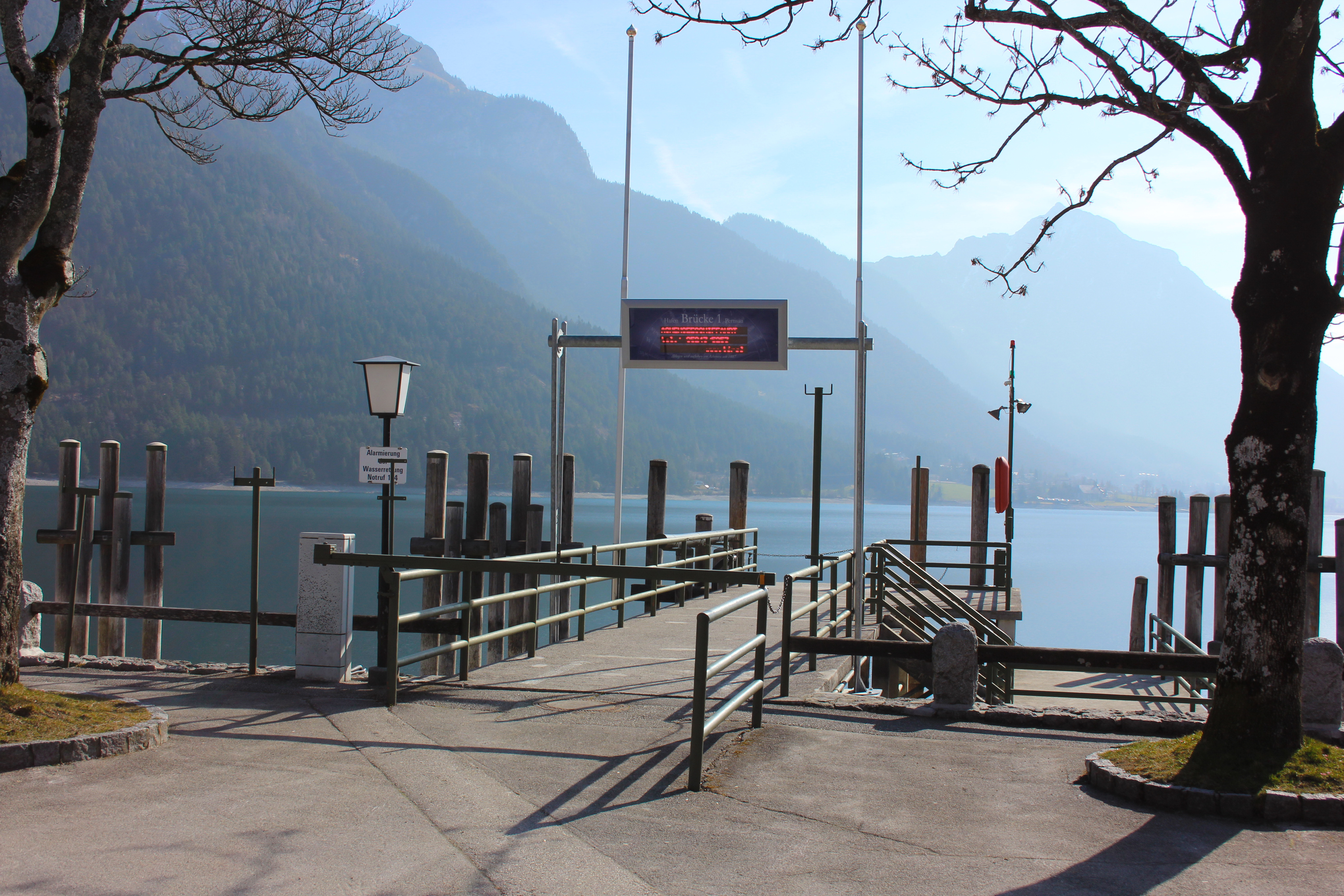 Bootsanlegebrücke im Achensee bei Pertisau